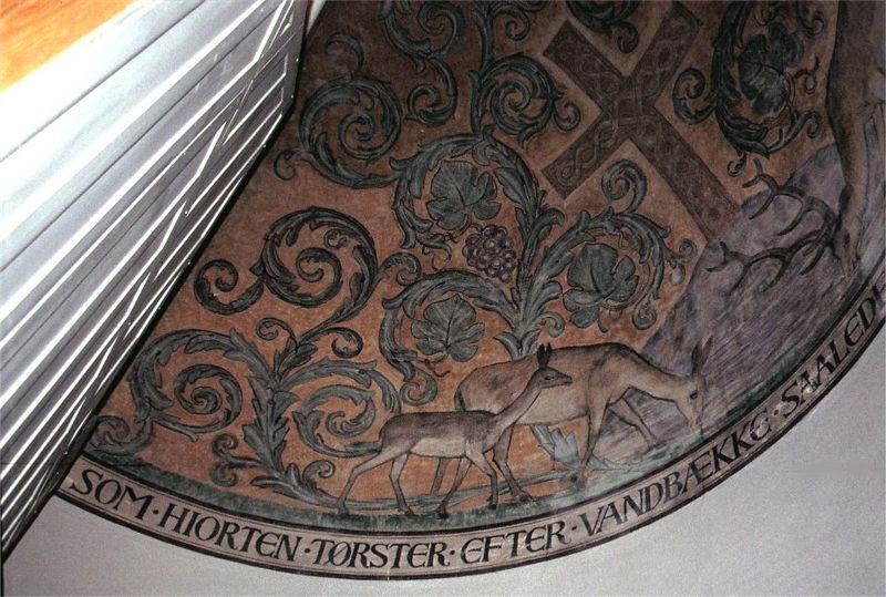 Holbæk Sankt Nikolai Kirke i Danmark. Apsidens halvkuppelhvælv